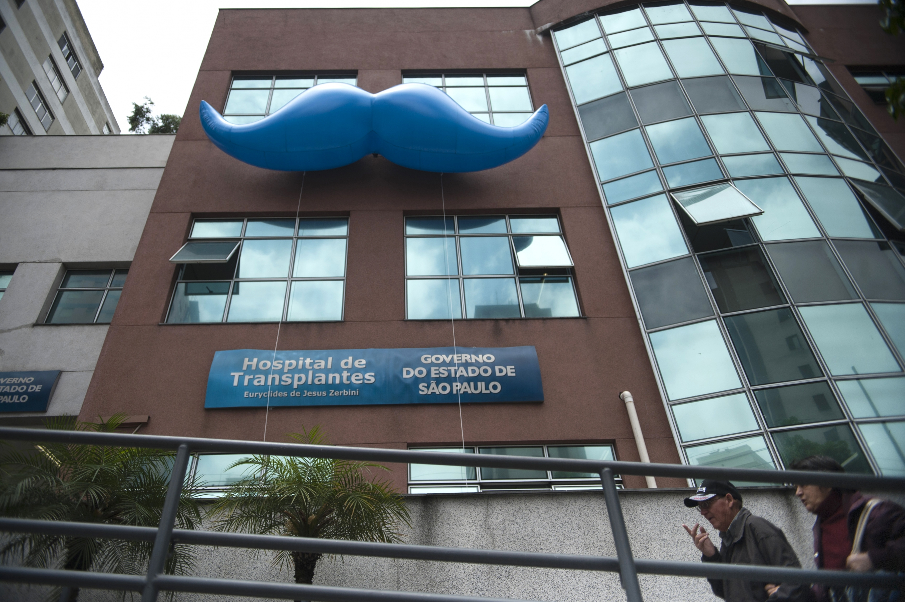 São Paulo - O Centro de Referência em Saúde do Homem, unidade da Secretaria Estadual de Saúde, aproveita o mês de prevenção ao câncer de próstata, conhecido como Novembro Azul, para esclarecer o público masculino sobre a doença. O alerta é simbolizado por um bigode inflável colocado na fachada do hospital